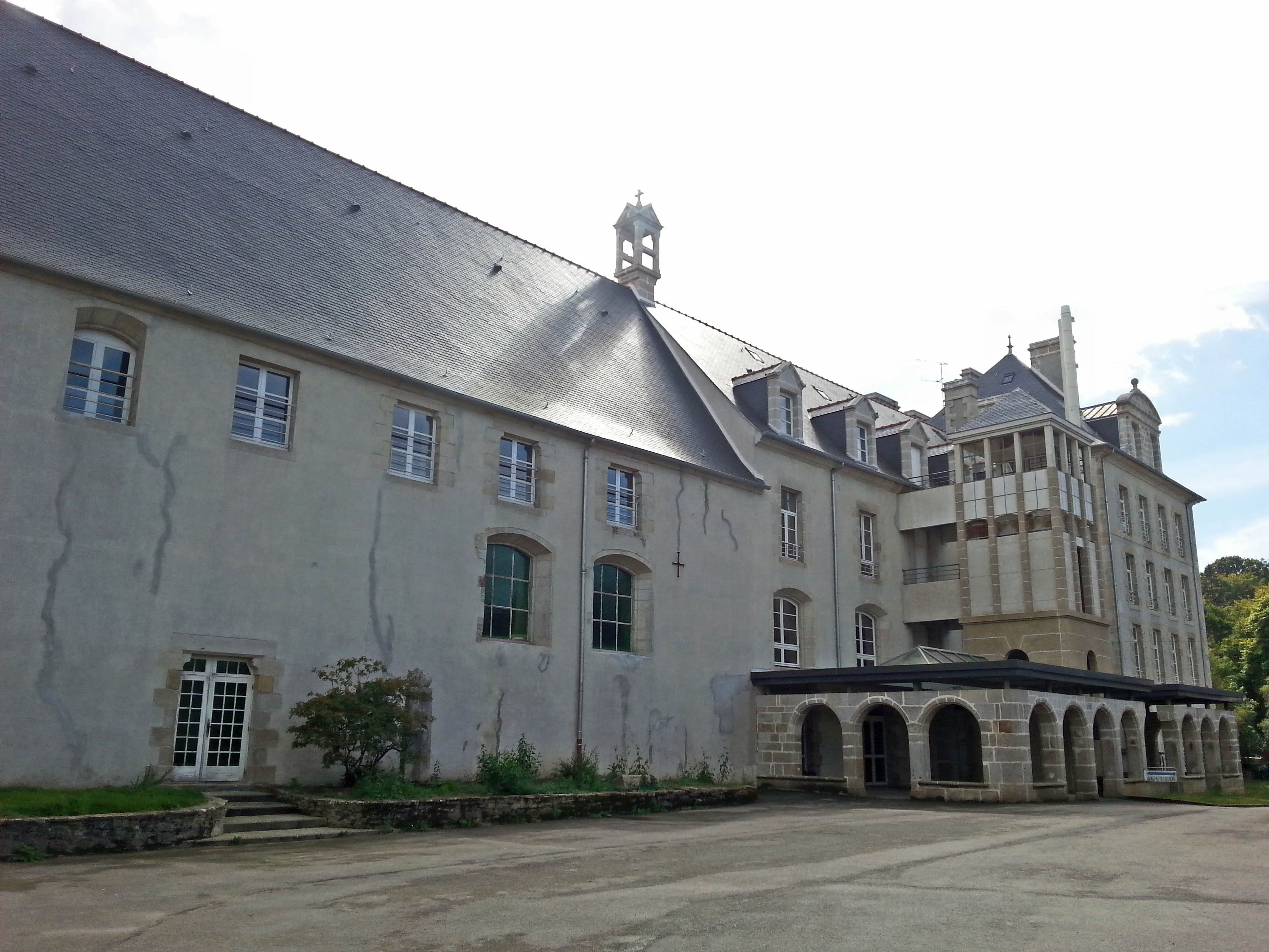 Lycée Chaptal in Quimper (Inscrit) .